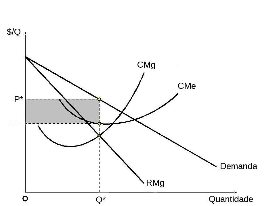 A imagem descreve o equilíbrio de uma empresa inserida na competição monopolística. No curto prazo, o custo médio é menor que o preço, e a empresa obtém lucro, representado pela área sombreada.